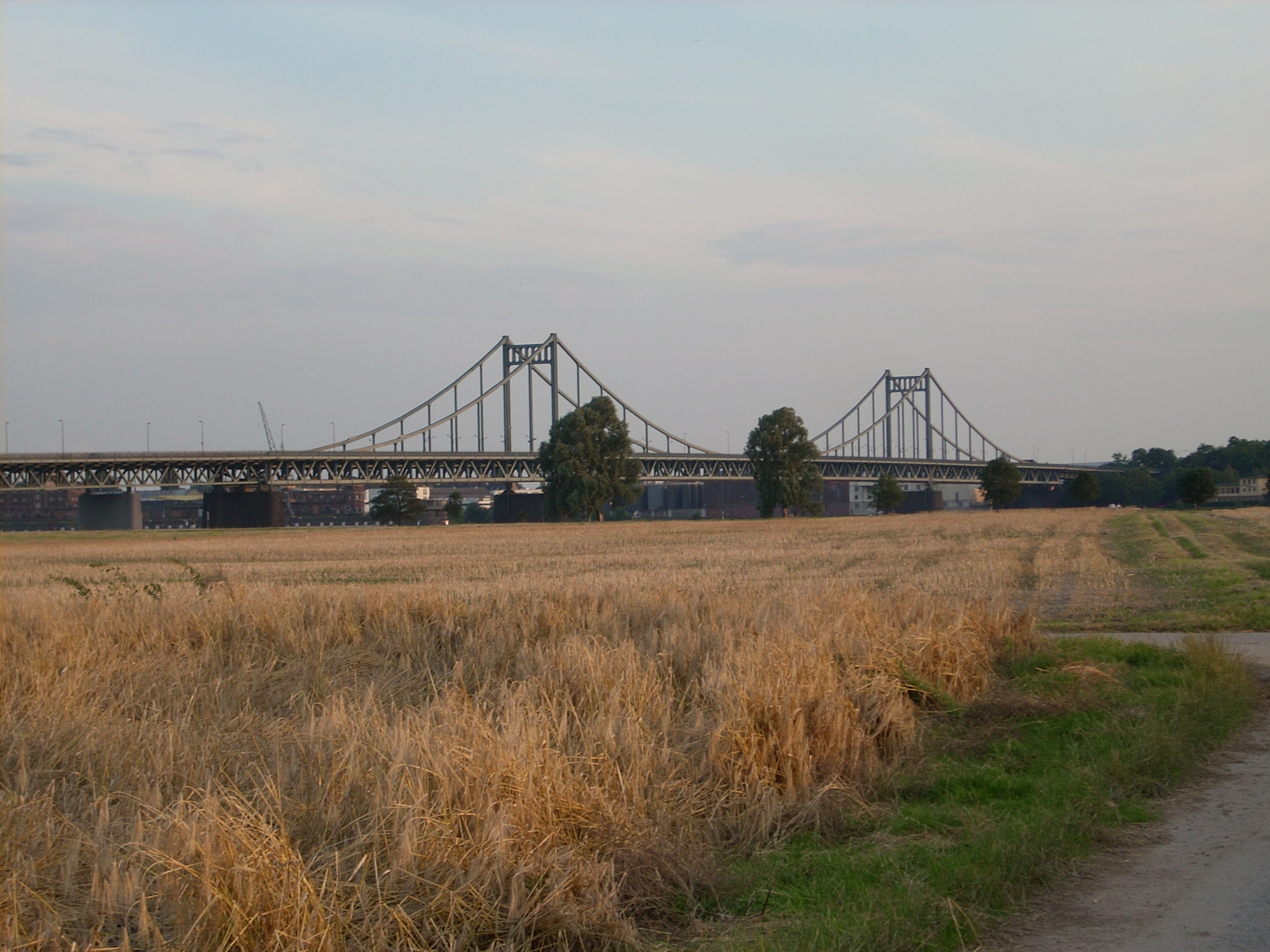 Die Krefeld-Uerdinger-Rheinbrücke aus Blickrichtung Duisburg-Mündelheim